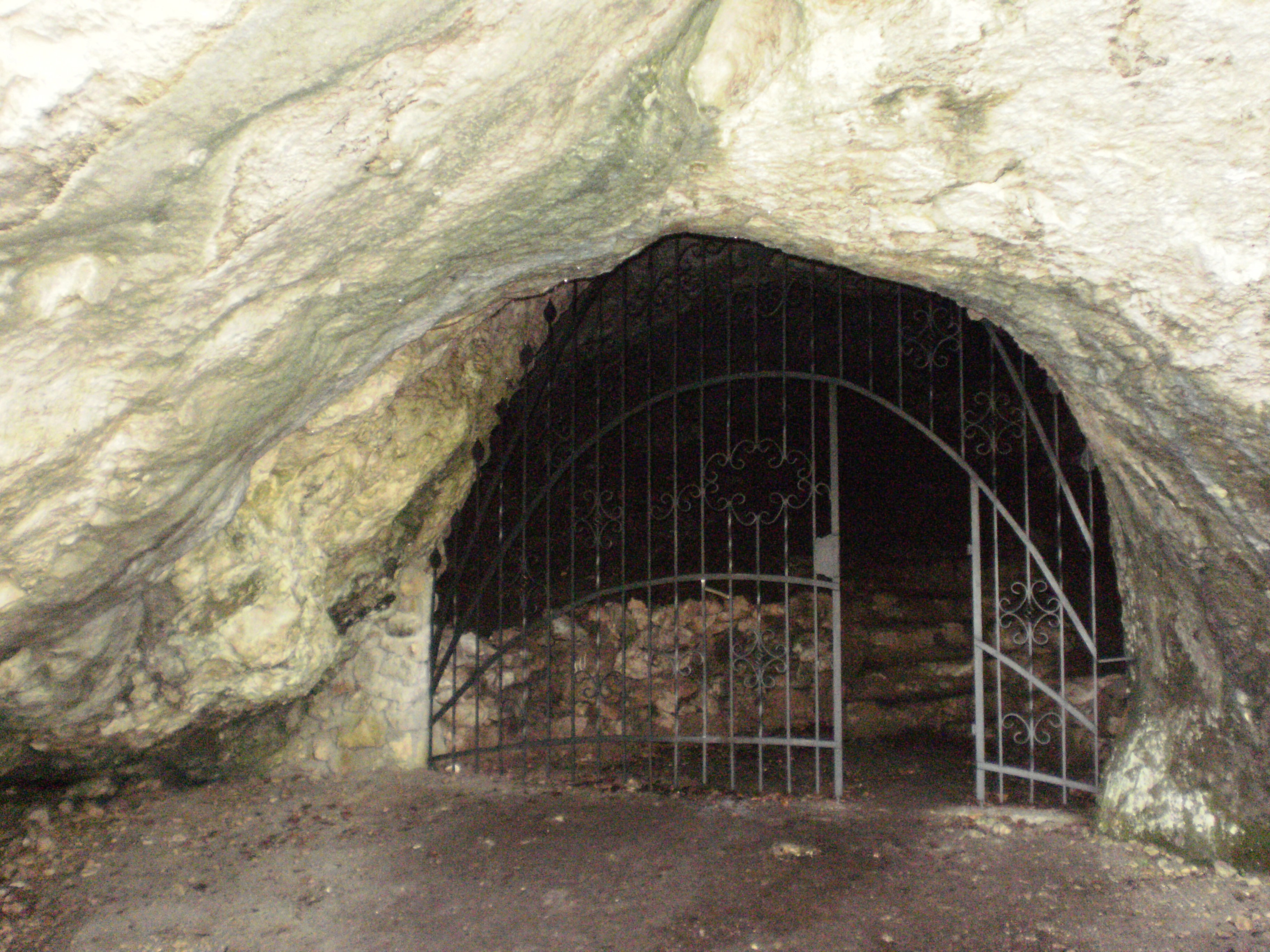 Vchod do Pružínskej Dupnej jaskyne